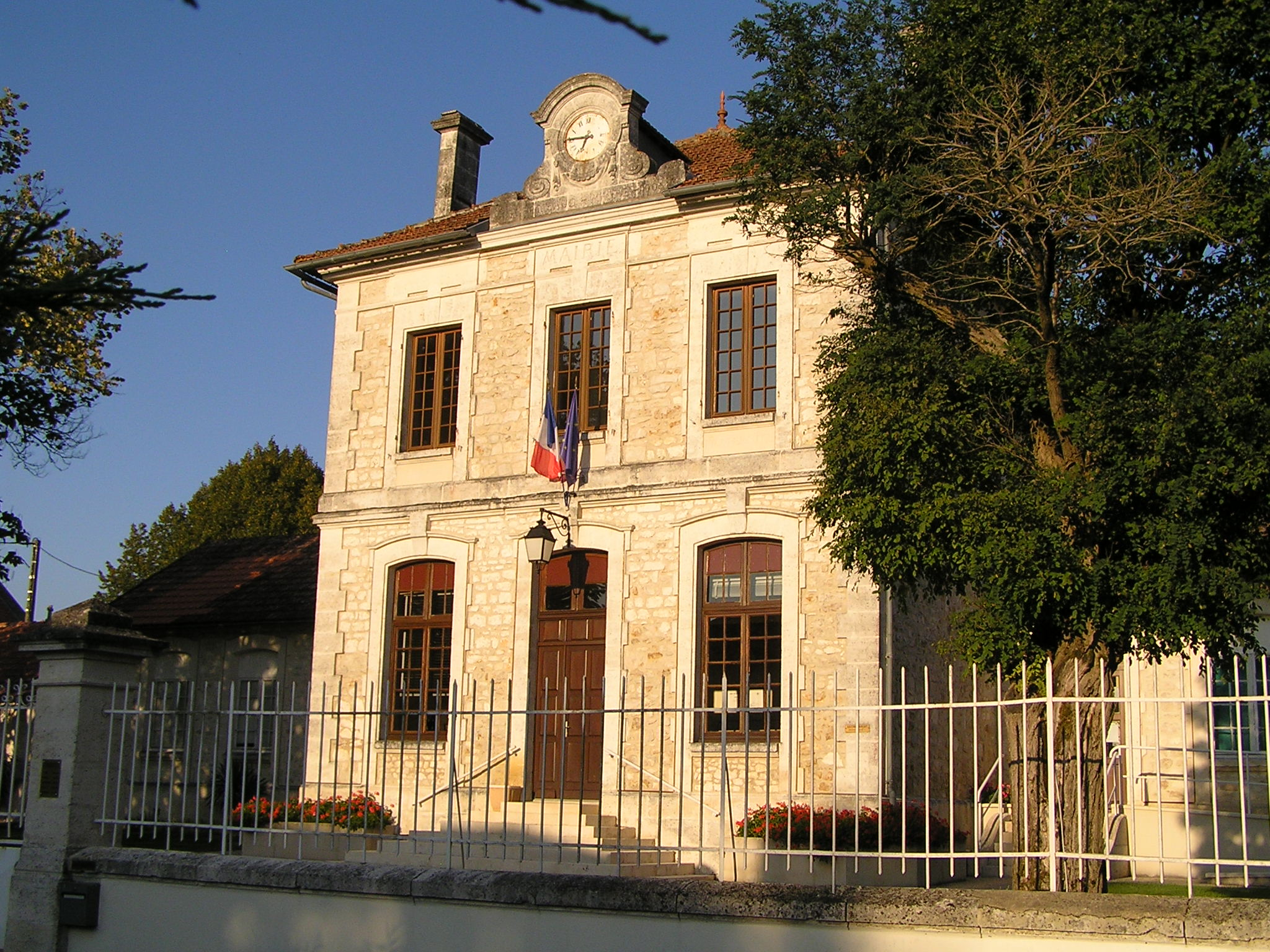 mairie de Vouzan